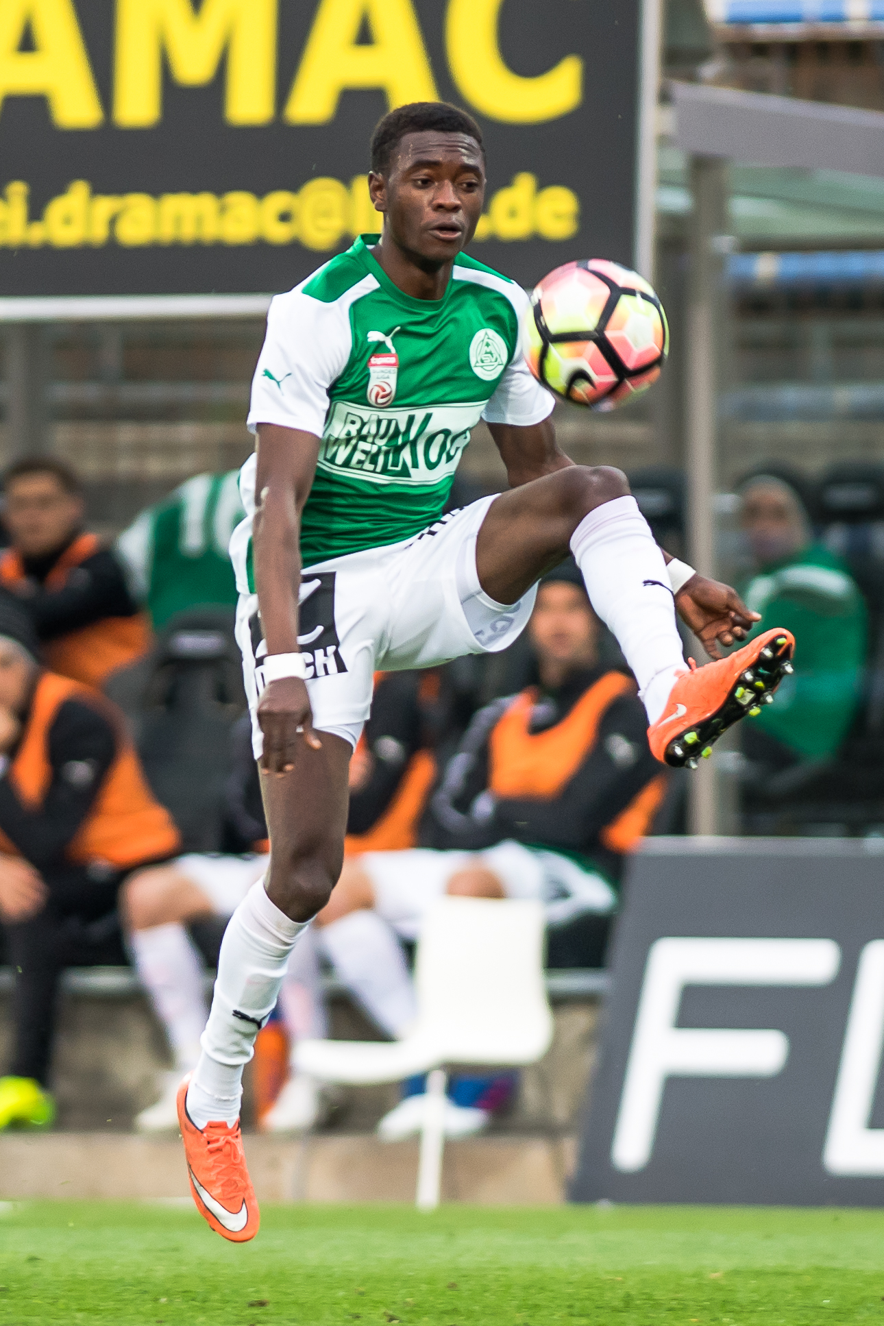 Maria Enzersdorf, Österreich, 8.4.2017, Sport, Fussball, Tipico Fussball Bundesliga - FC Flyeralarm Admira vs SV Mattersburg. Bild zeigt David Atanga (SVM).